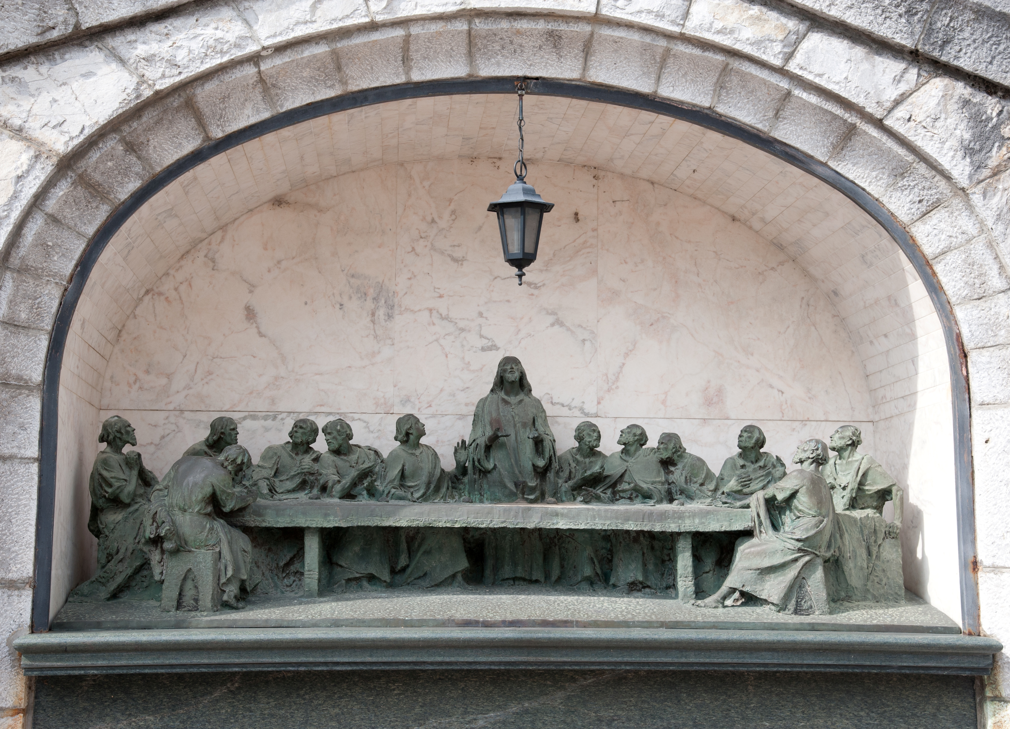 Via Crucis dello scultore Michele Vedani This is a photo of a monument which is part of cultural heritage of Italy.